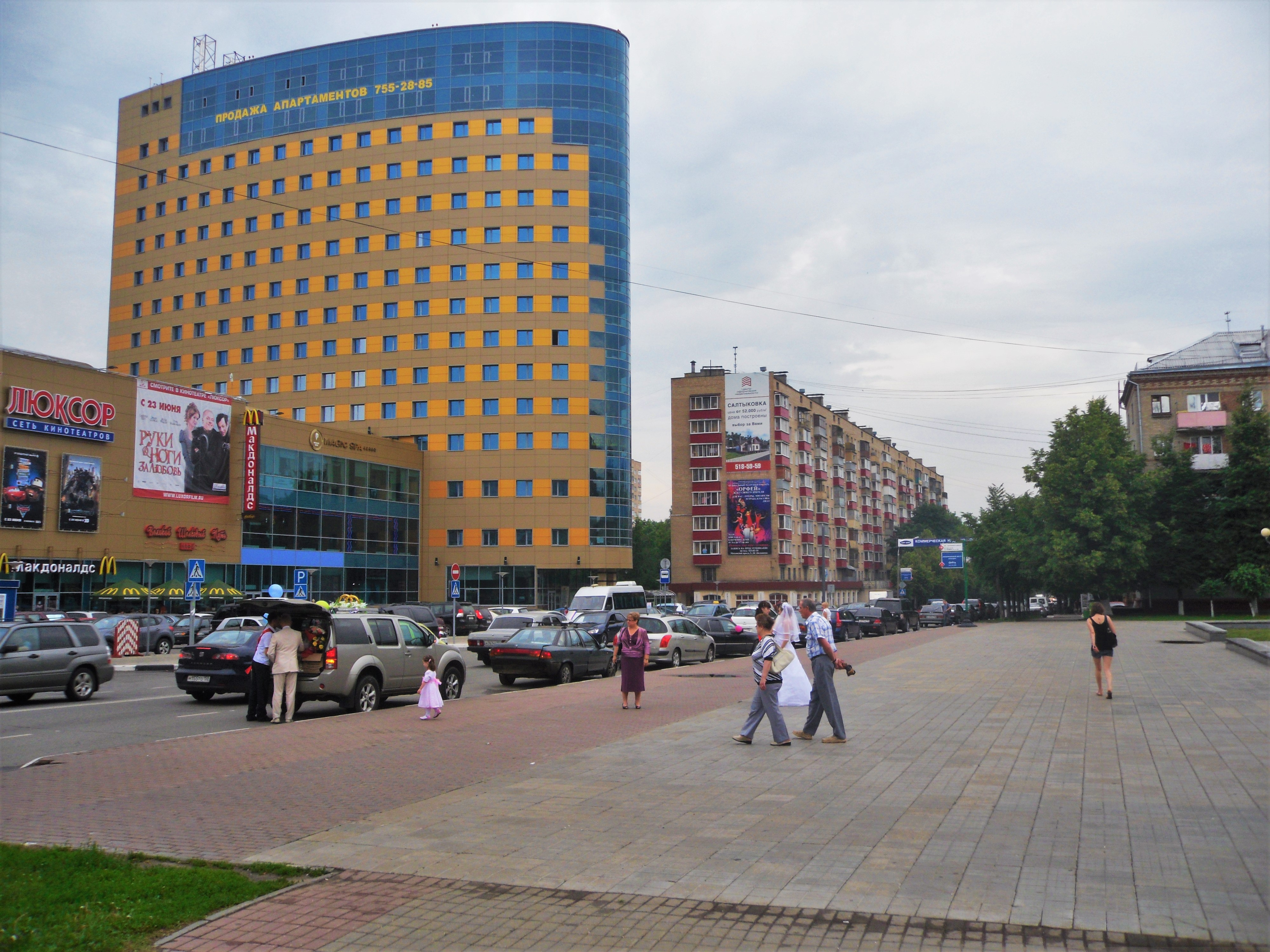 Проспект Ленина в Балашихе в районе площади Славы